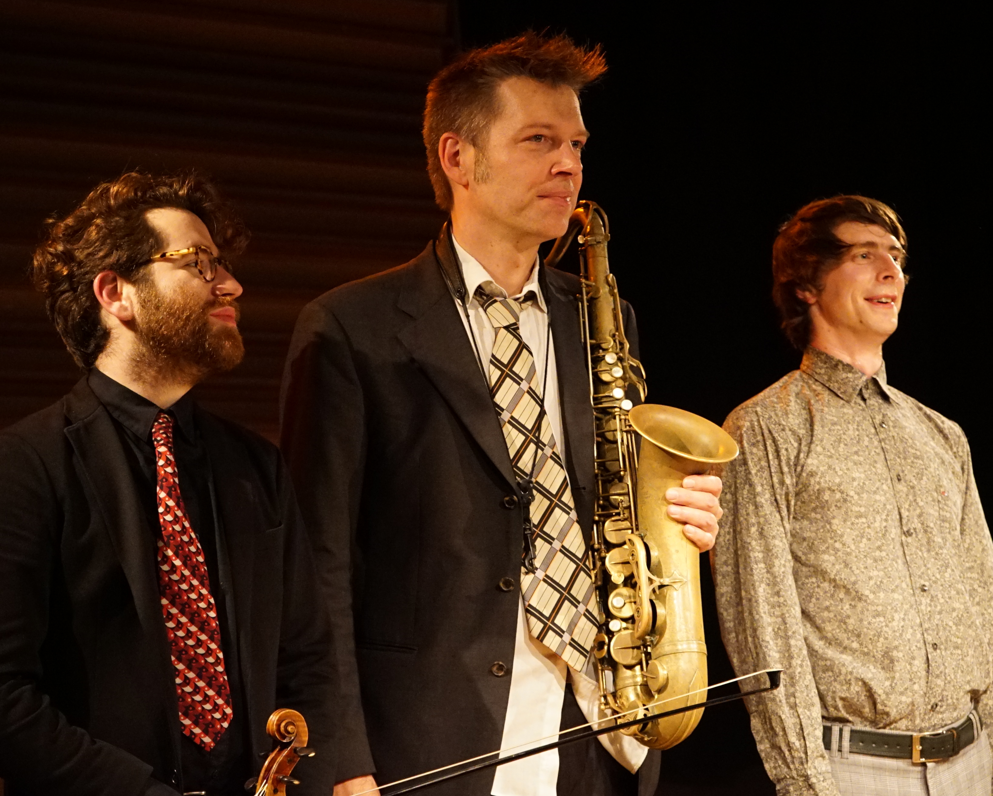 projet Velvet Revolution à Césaré.